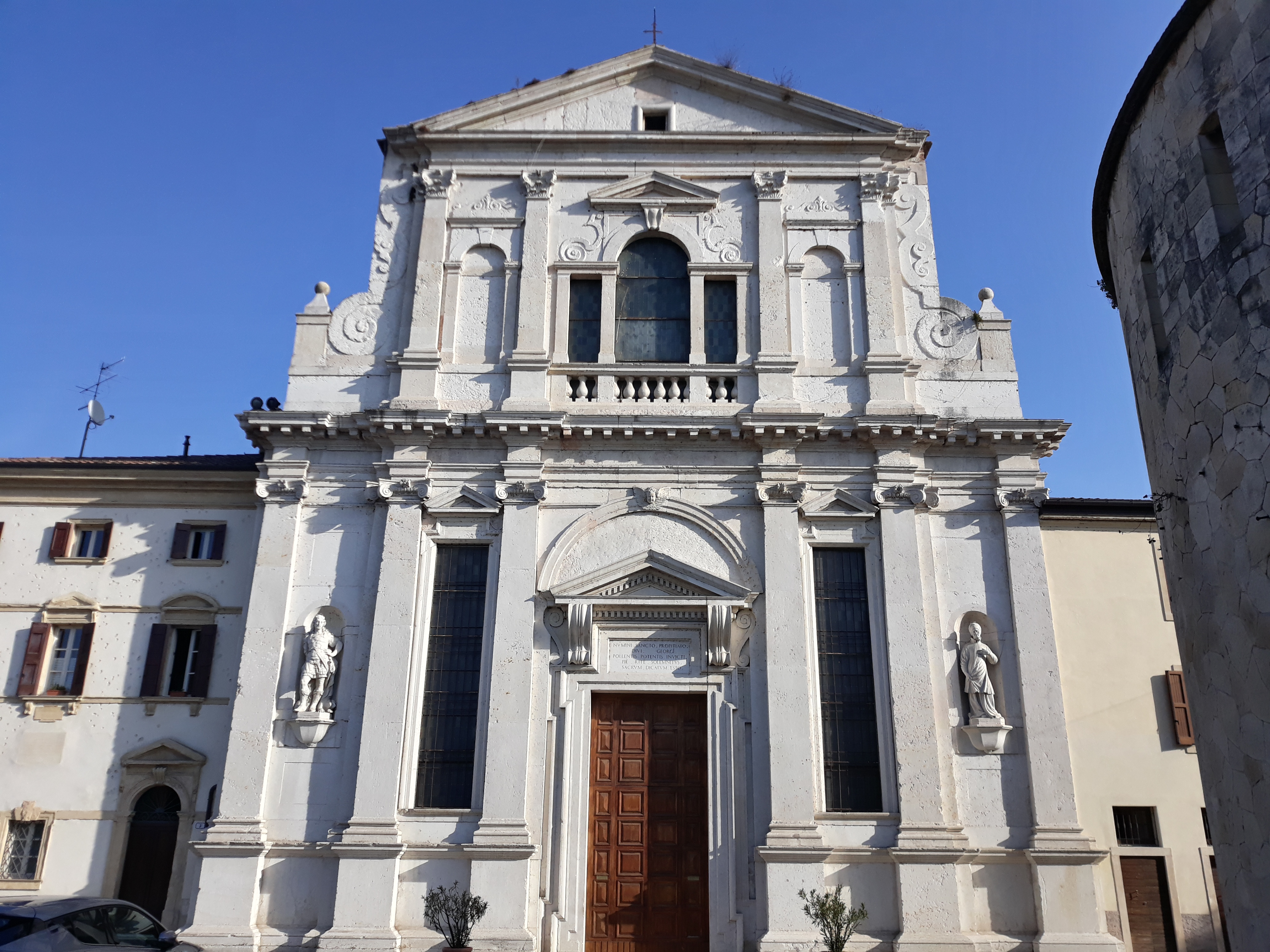 Facciata della chiesa di San Giorgio in Braida a Verona